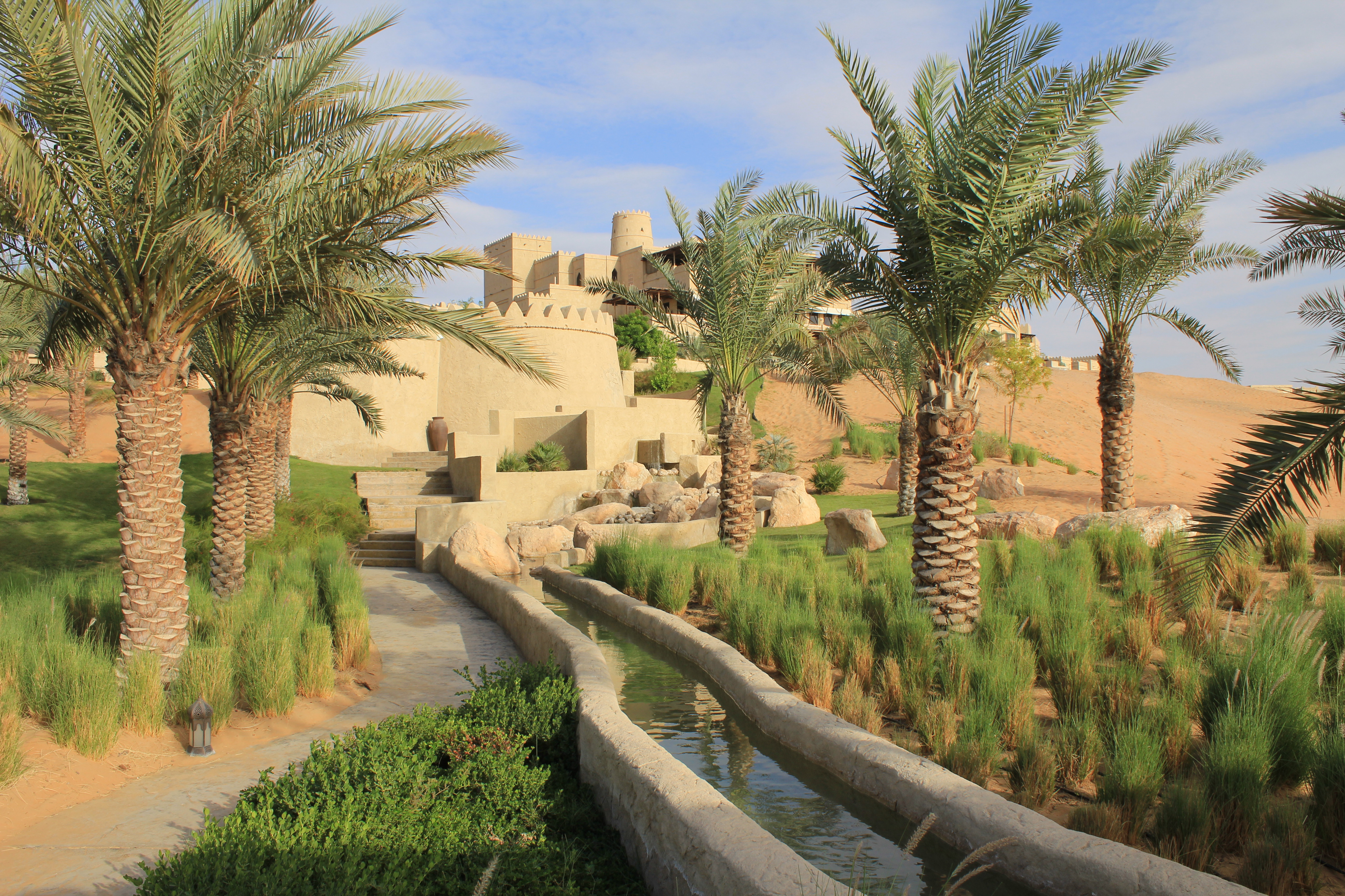 canal